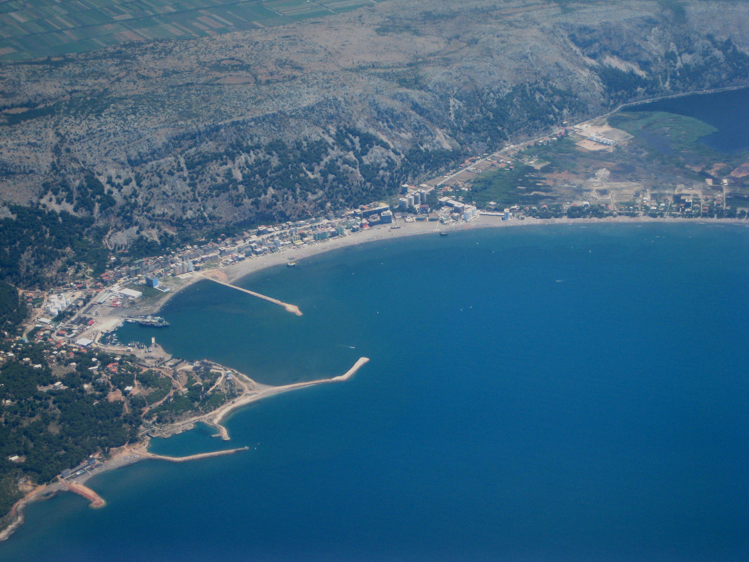 Shëngjin – Albania